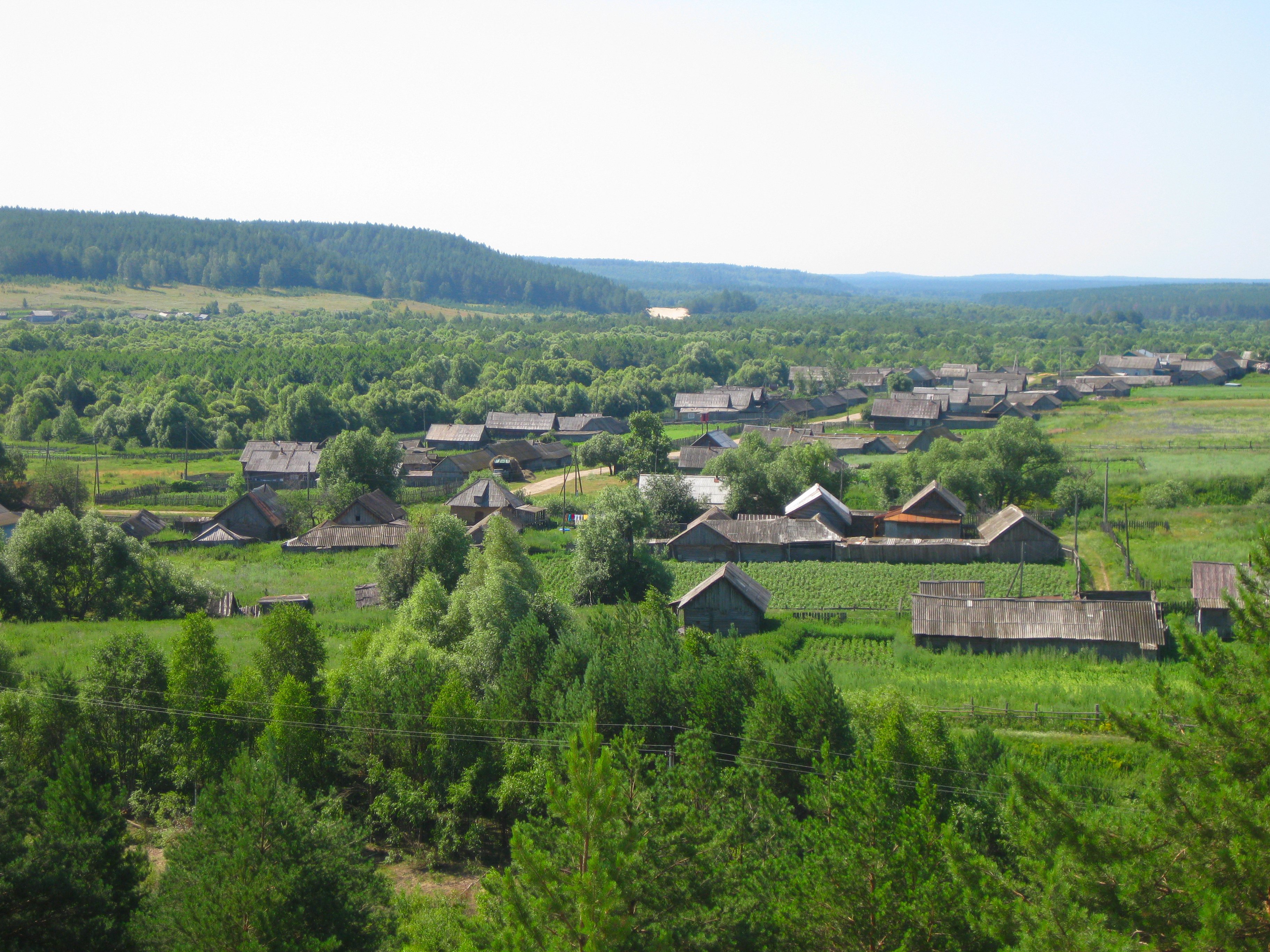 пос. Шкудим. Расейка и Новый Шкудим